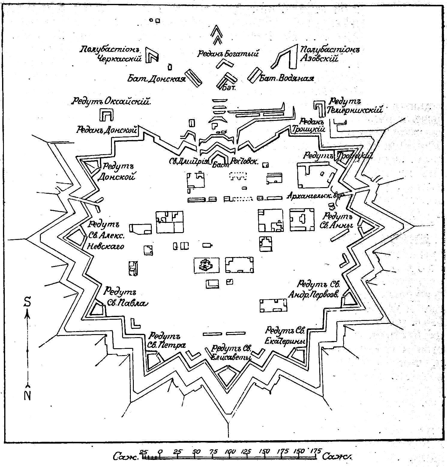 Это изображение было использовано для иллюстрирования статьи «Дмитрия Ростовского (Святого) крепость» опубликованной в девятом томе «Военной энциклопедии», который был издан книгоиздательским товариществом И. Д. Сытина в 1912 году в столице Российской империи городе Санкт-Петербурге.